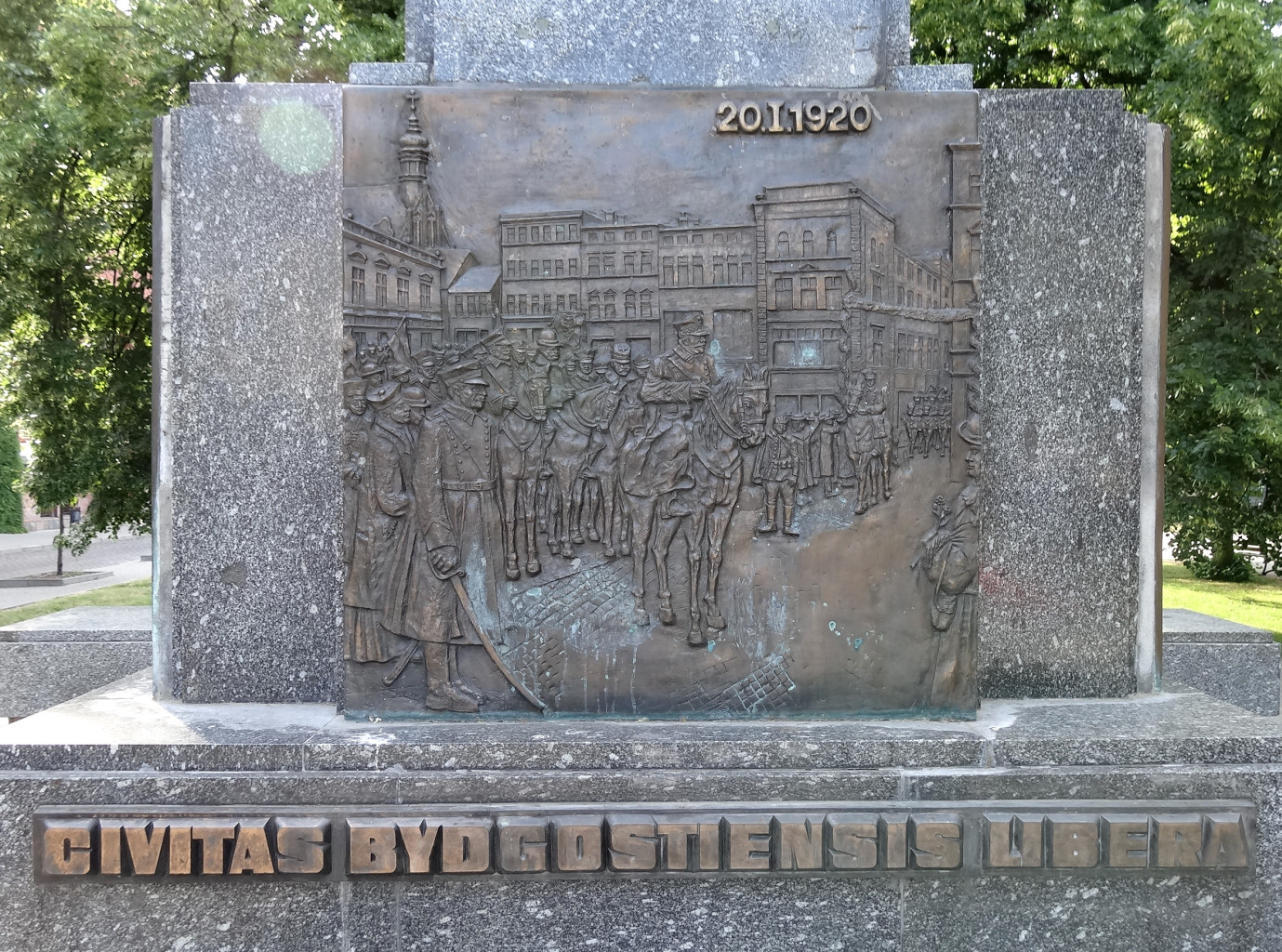 Pomnik Wolności w Bydgoszczy (1945, Jan Kossowski) zlokalizowany na placu Wolności